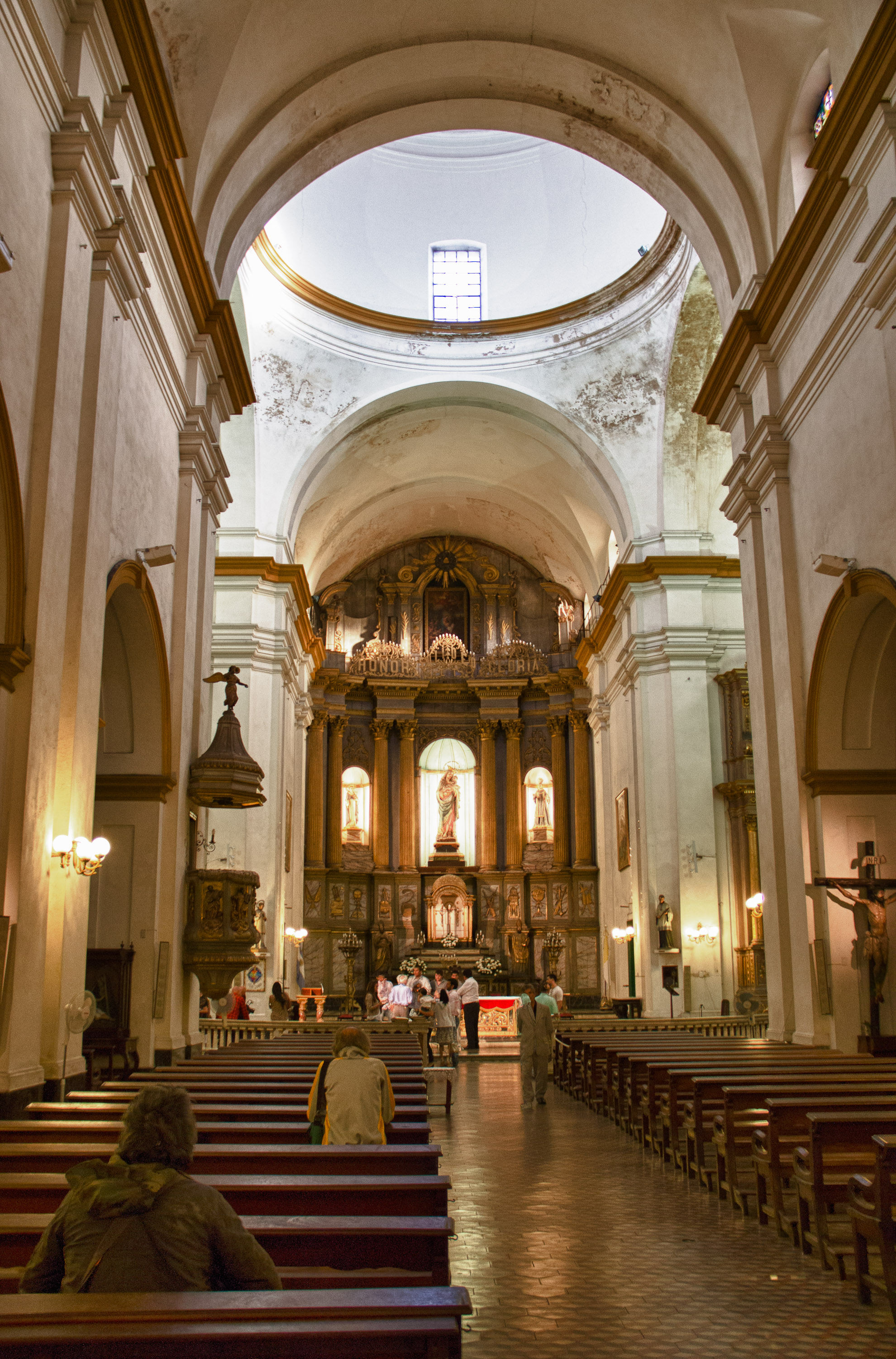 Iglesia de San Pedro González Telmo. Fotografía procesada con técnica de ampliación de rango dinámico.